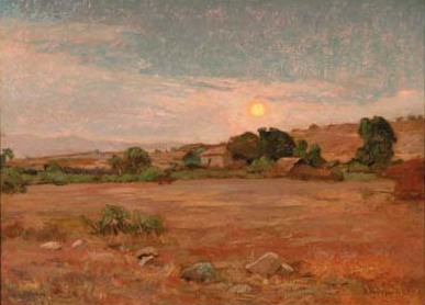 paisaje por valenzuela llanos